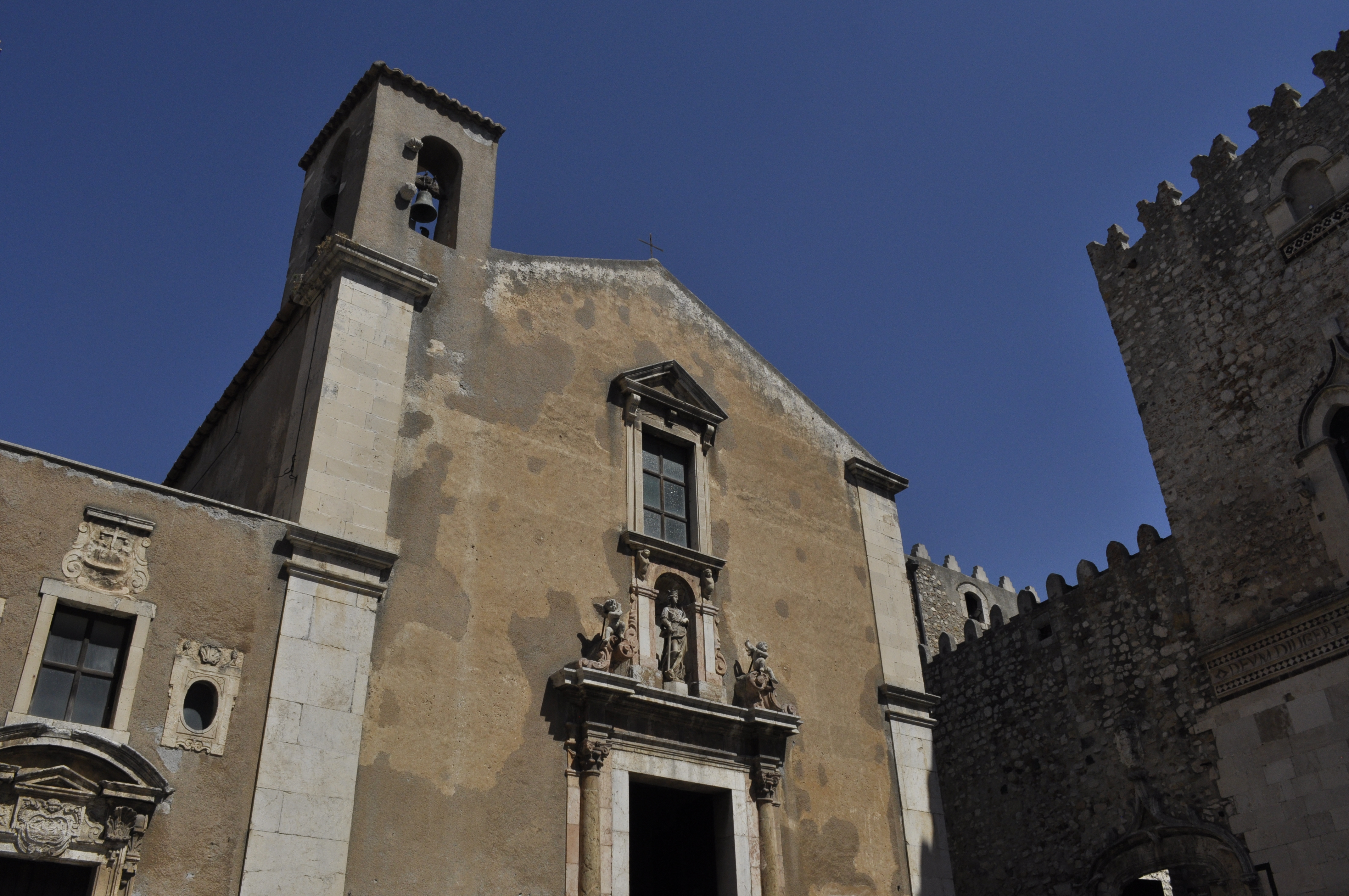 Prospetto della chiesa